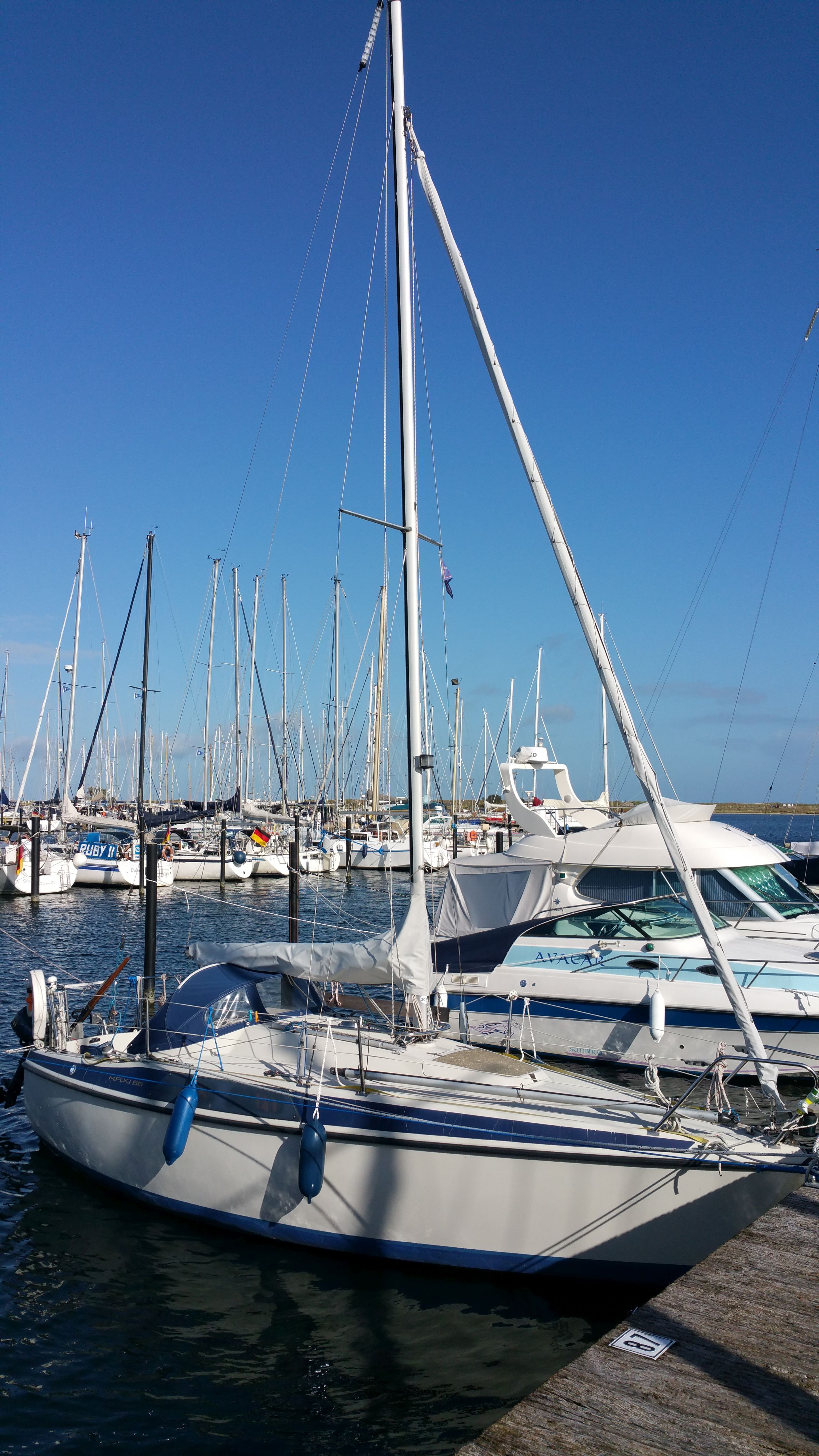 Segelboot vom Typ Maxi 68